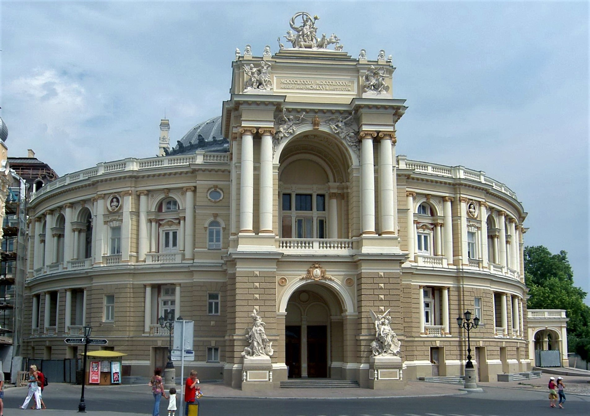 Opera v Oděse